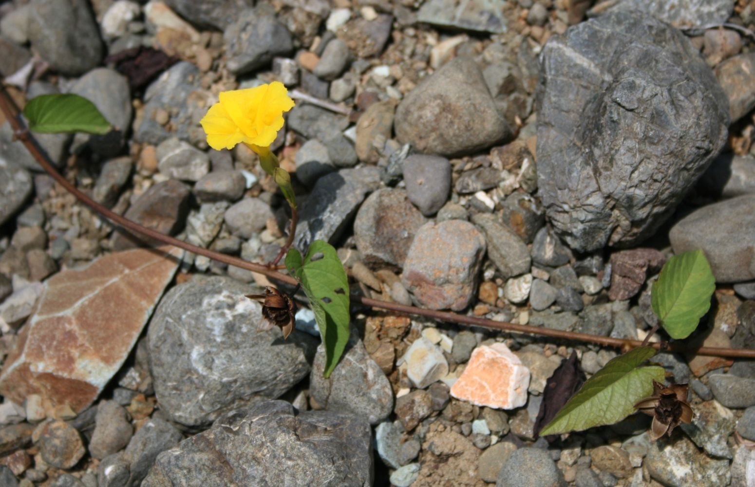 Merremia umbellata, Windengewächse (Convolvulaceae) - Costa Rica: Prov. Puntarenas, La Gamba NW Golfito, Valle Bonito